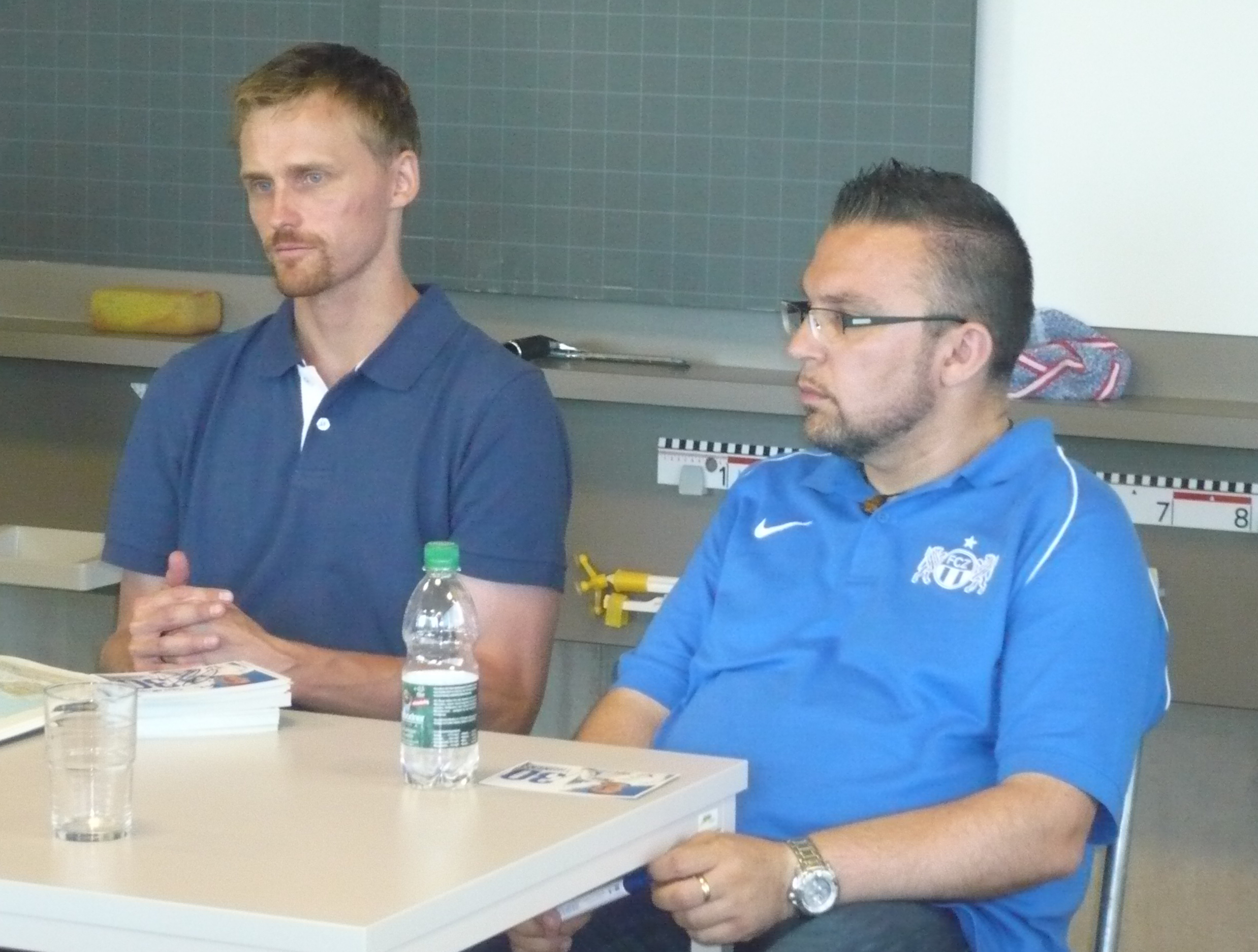 Hannu Tihinen und Medienverantwortlicher des FCZ Giovanni Marti